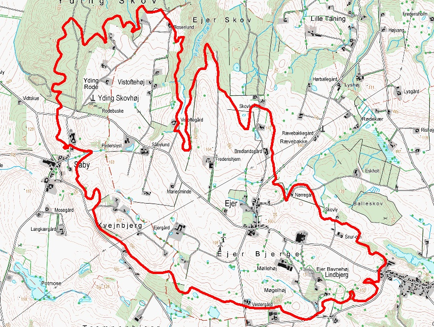 Ejer Bjerge 140 moh. Geodatastyrelsen 2014